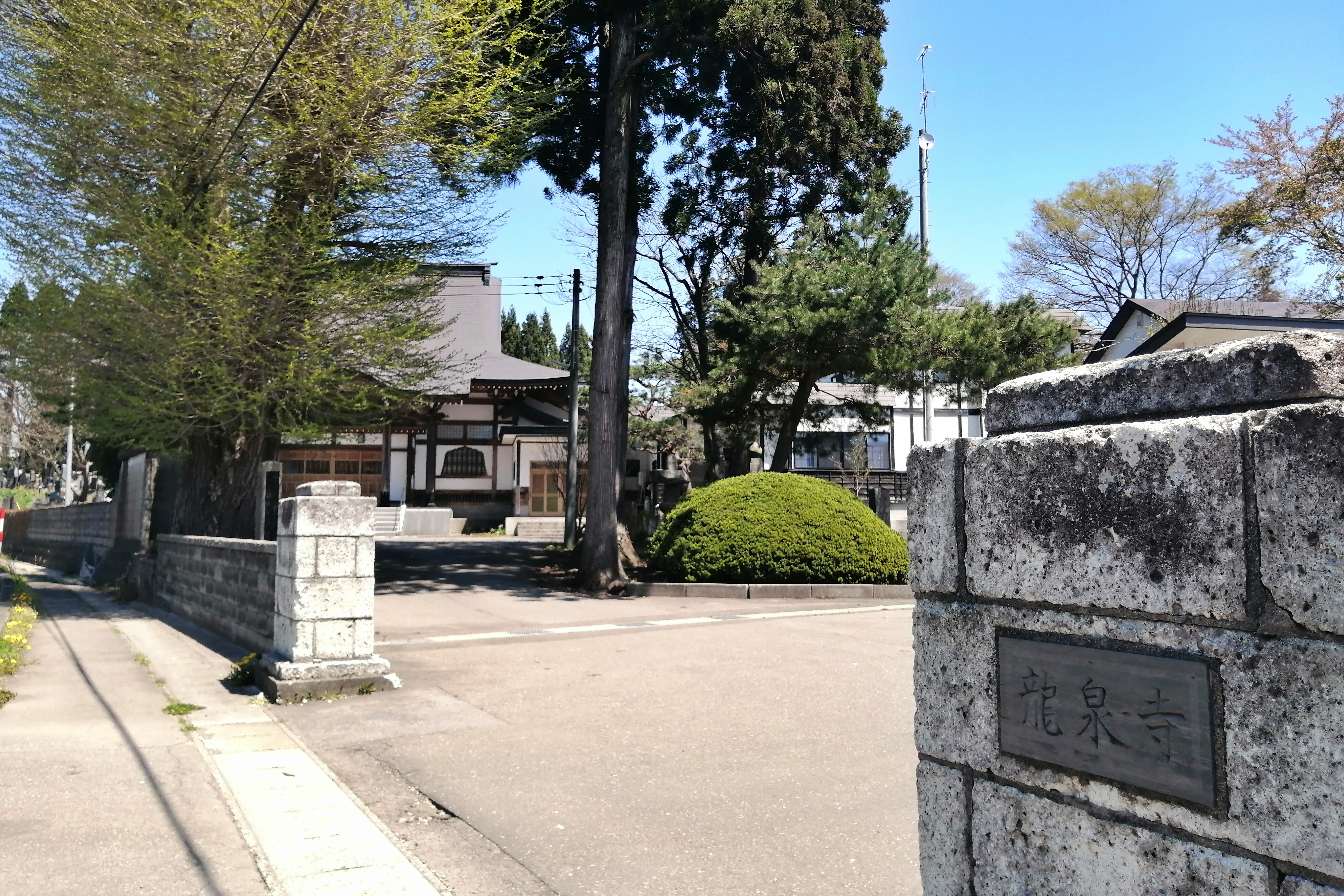 龍泉寺 - 北秋田市七日市